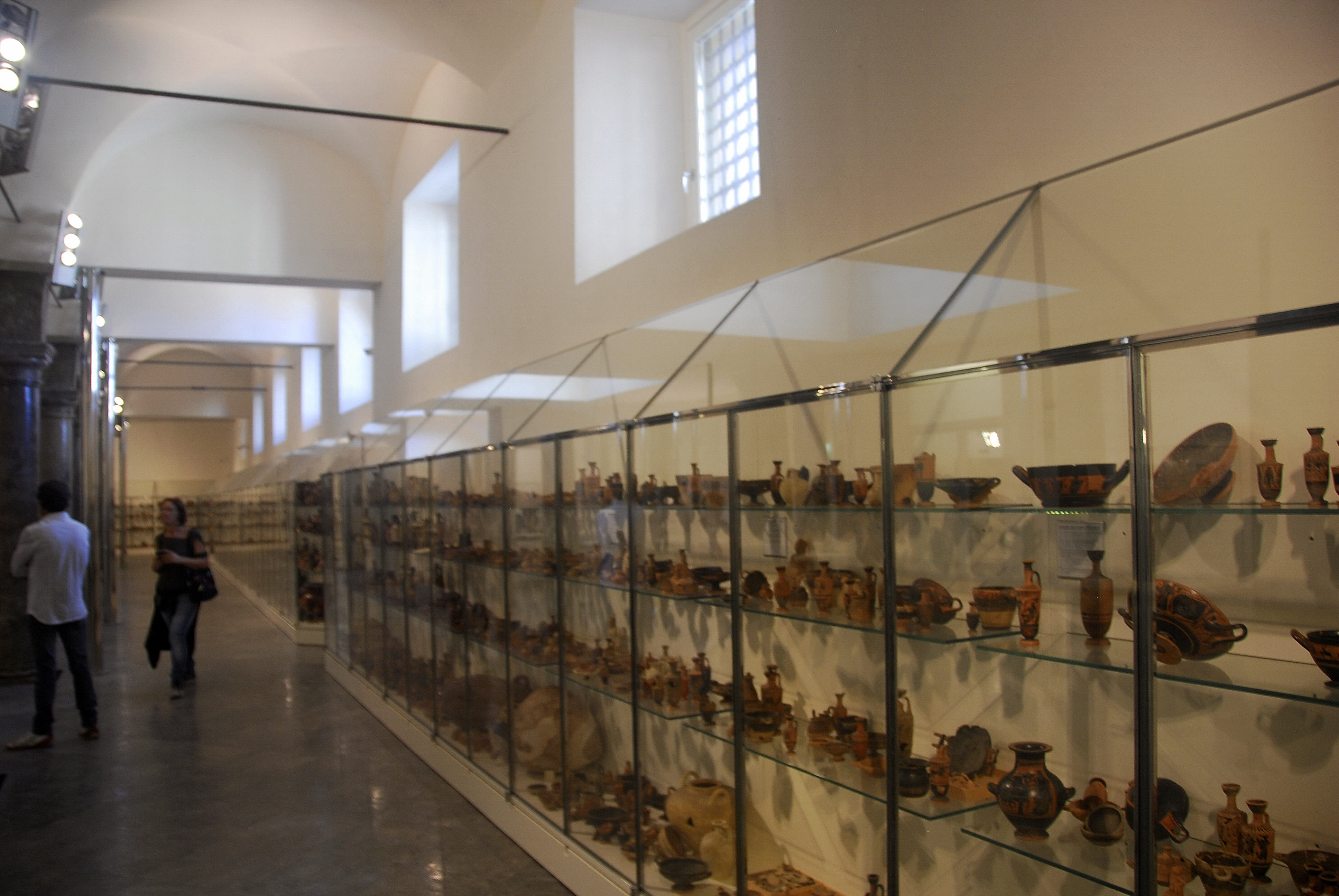 Palermo, ITA